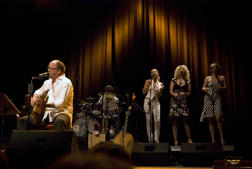 Hans Werner Olm: Sing Dein Ding